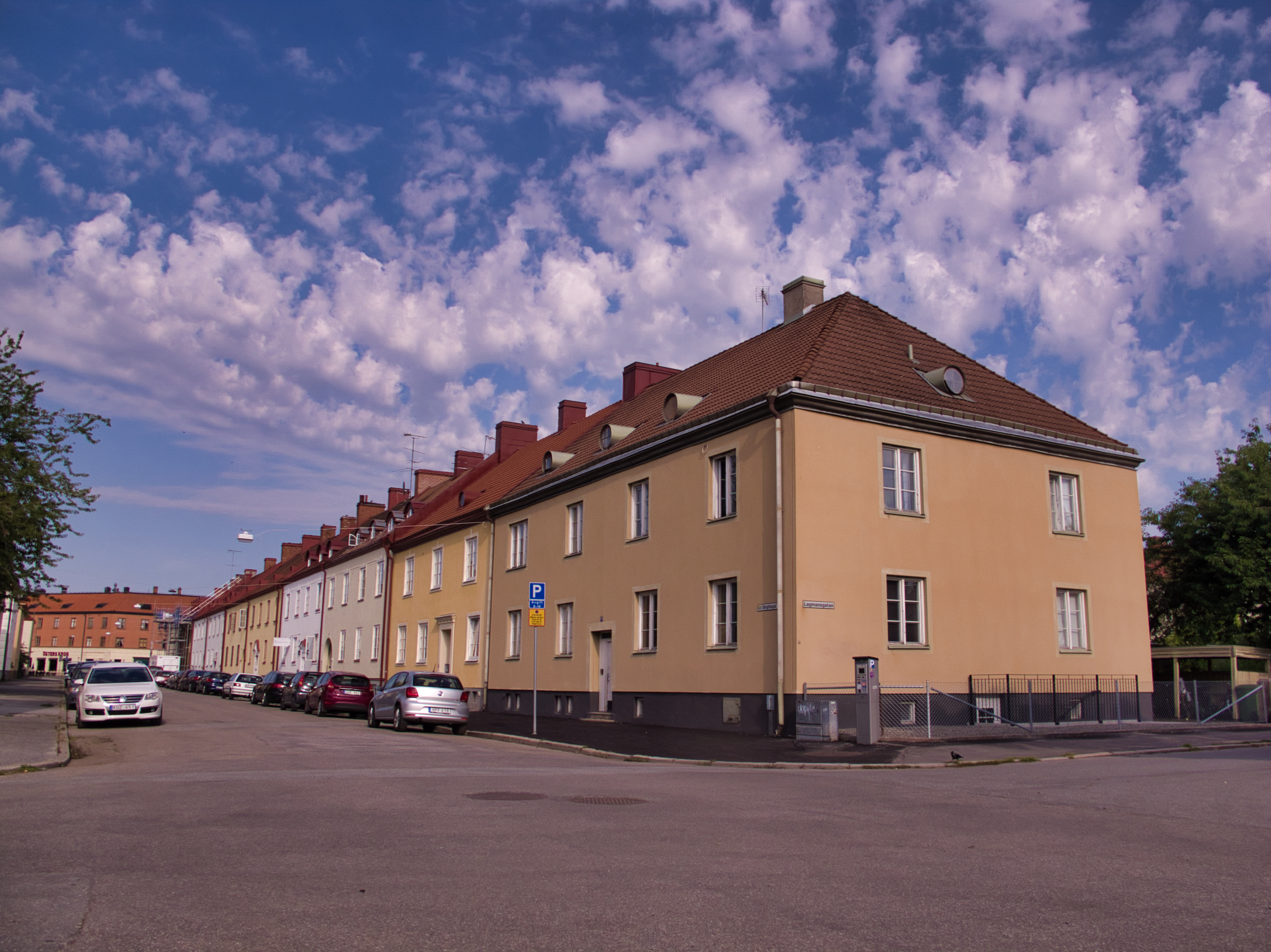 Sancta Birgittagatan från Lagmansgatan och västerut, Ftitz Bengtson arkitekt och byggmästare